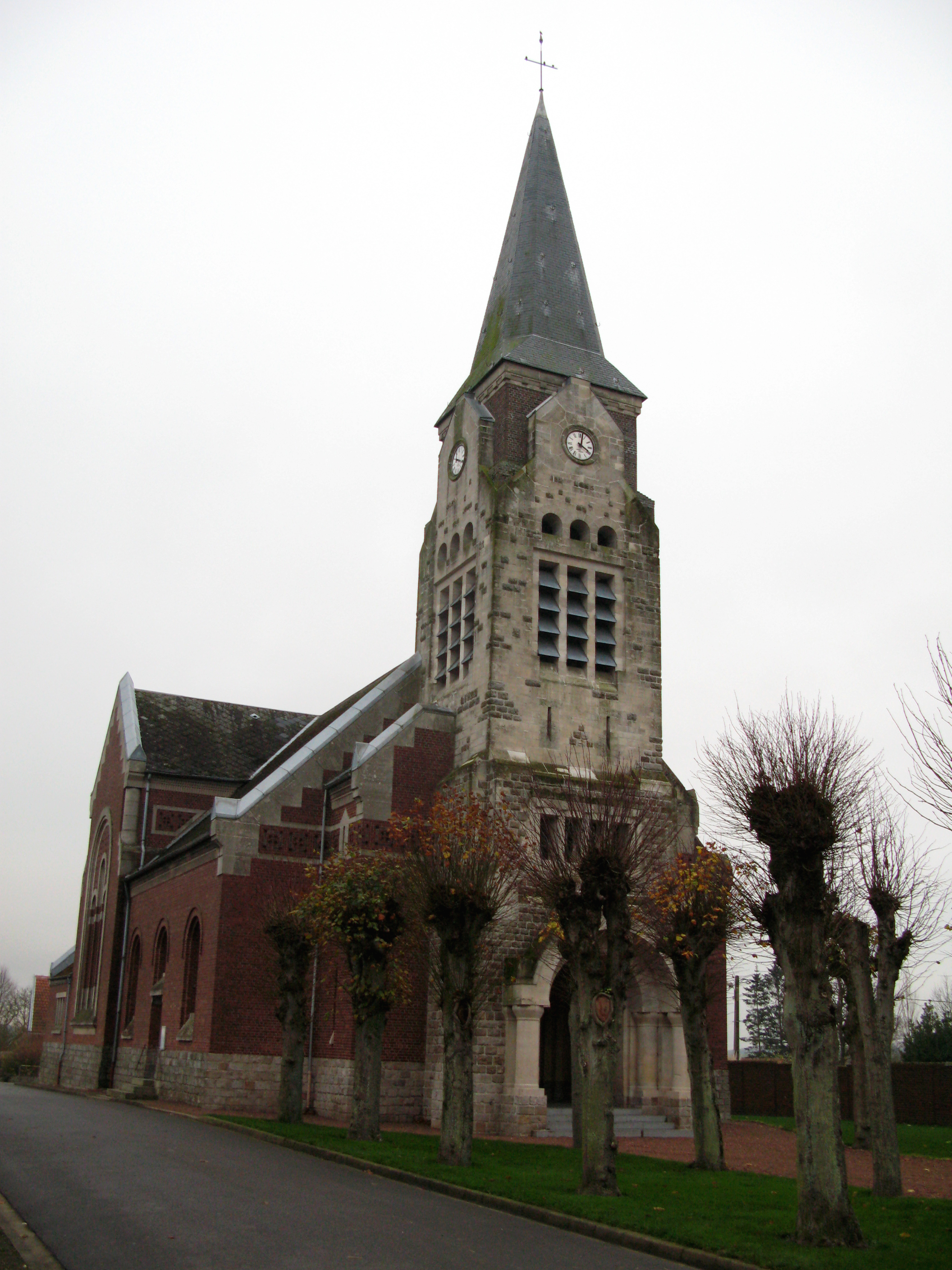 Heudicourt (Somme, France) - L'église. .